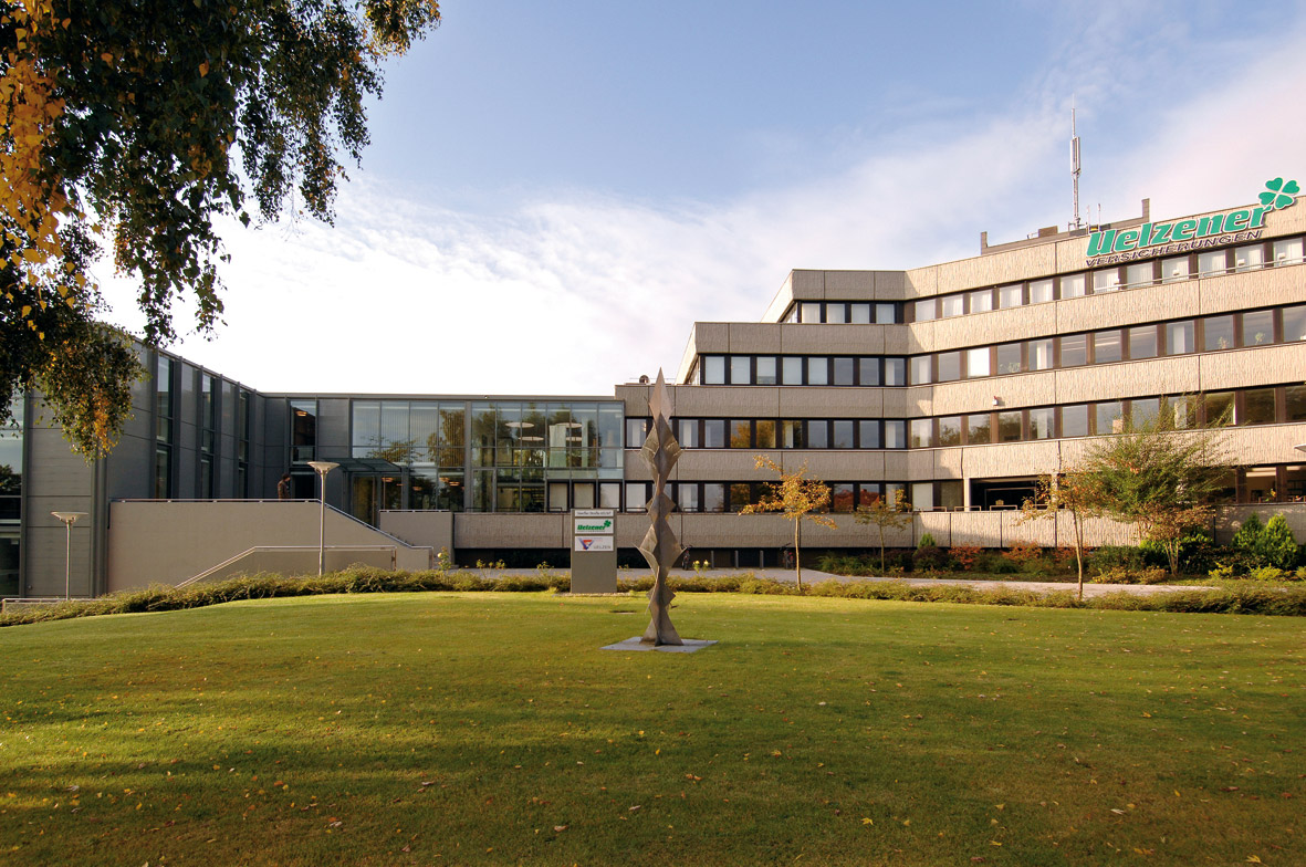 Uelzener Versicherungen Hausbild